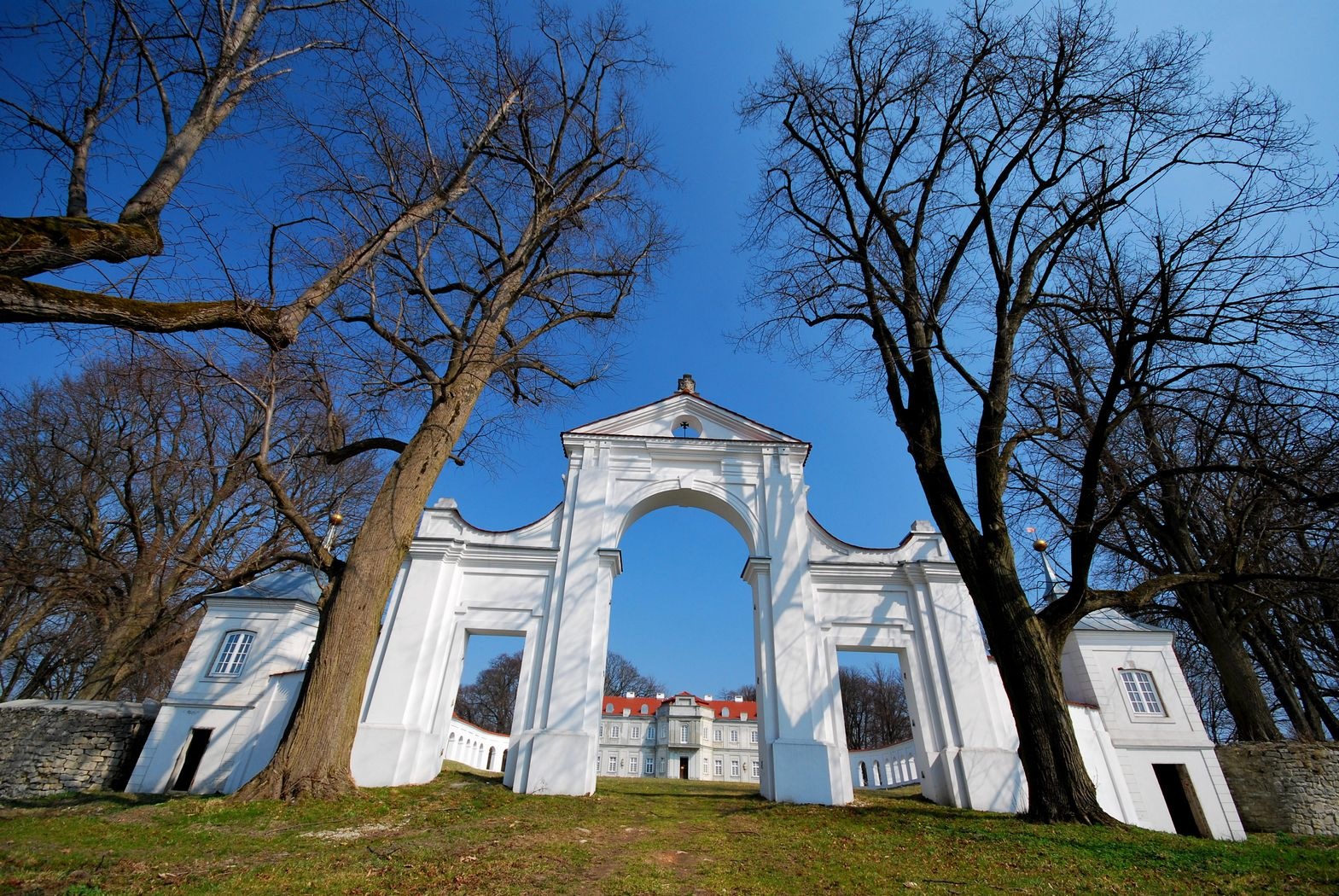 zespół pałacowy park z alejami dojazdowymi i widokowymi w zespole pałacowym Narol, Narol